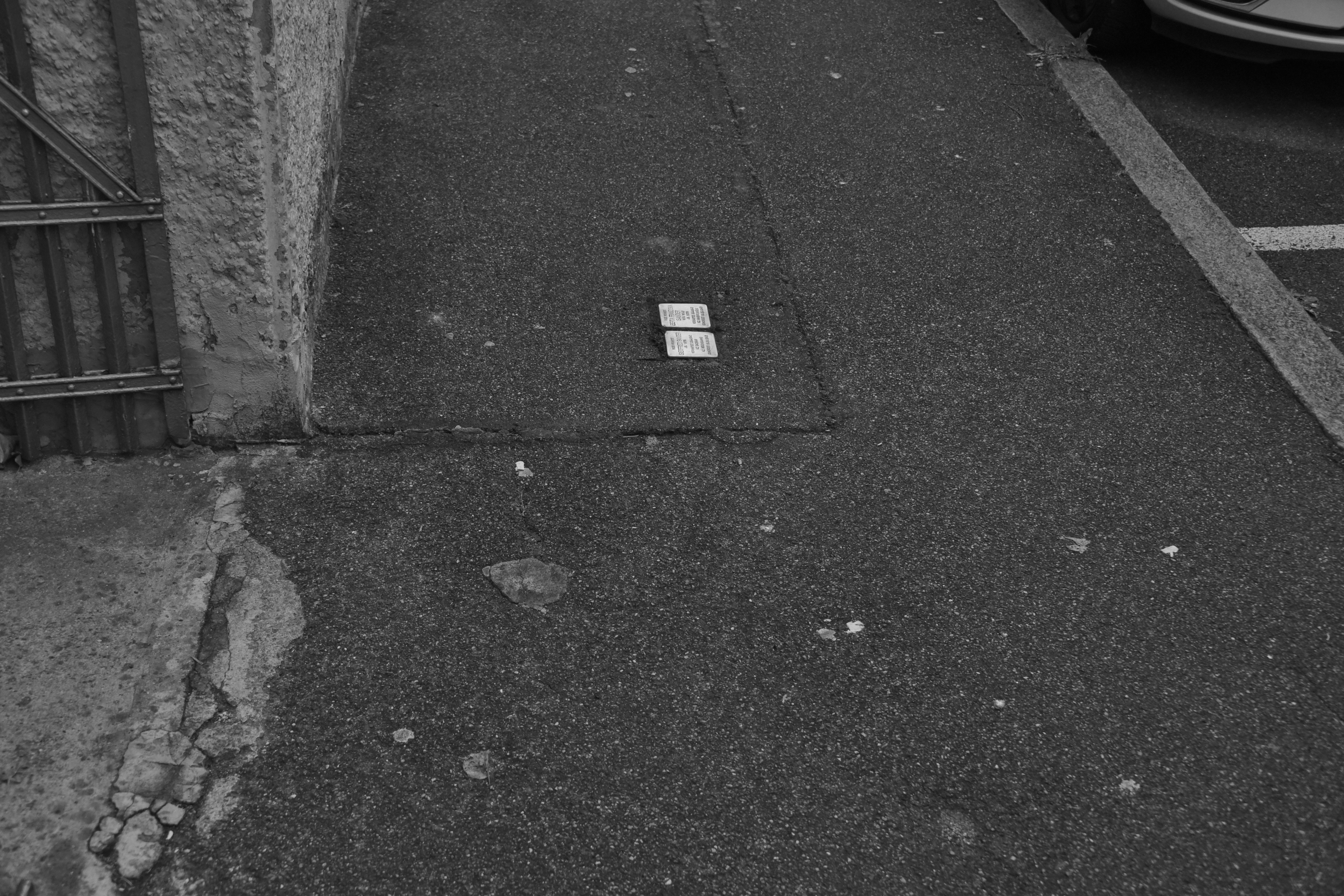 Stolpersteine für das Ehepaar Sander in Stuttgart, Vandalenstraße 23